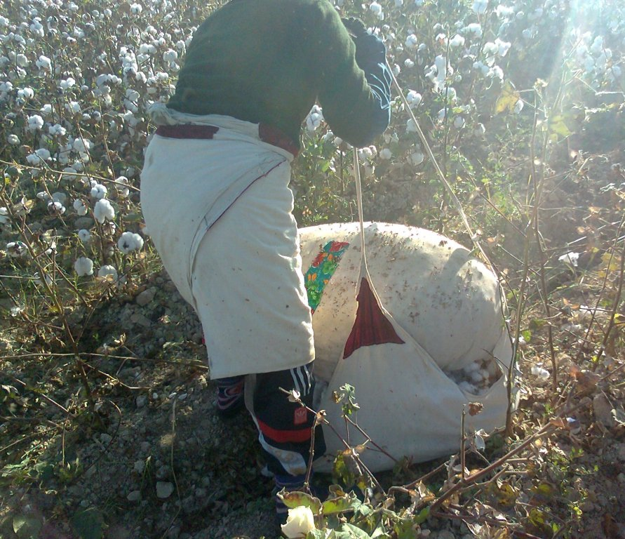 Техника упаковывания в фартук собранного хлопка сырца в хлопковых полях Узбекистана